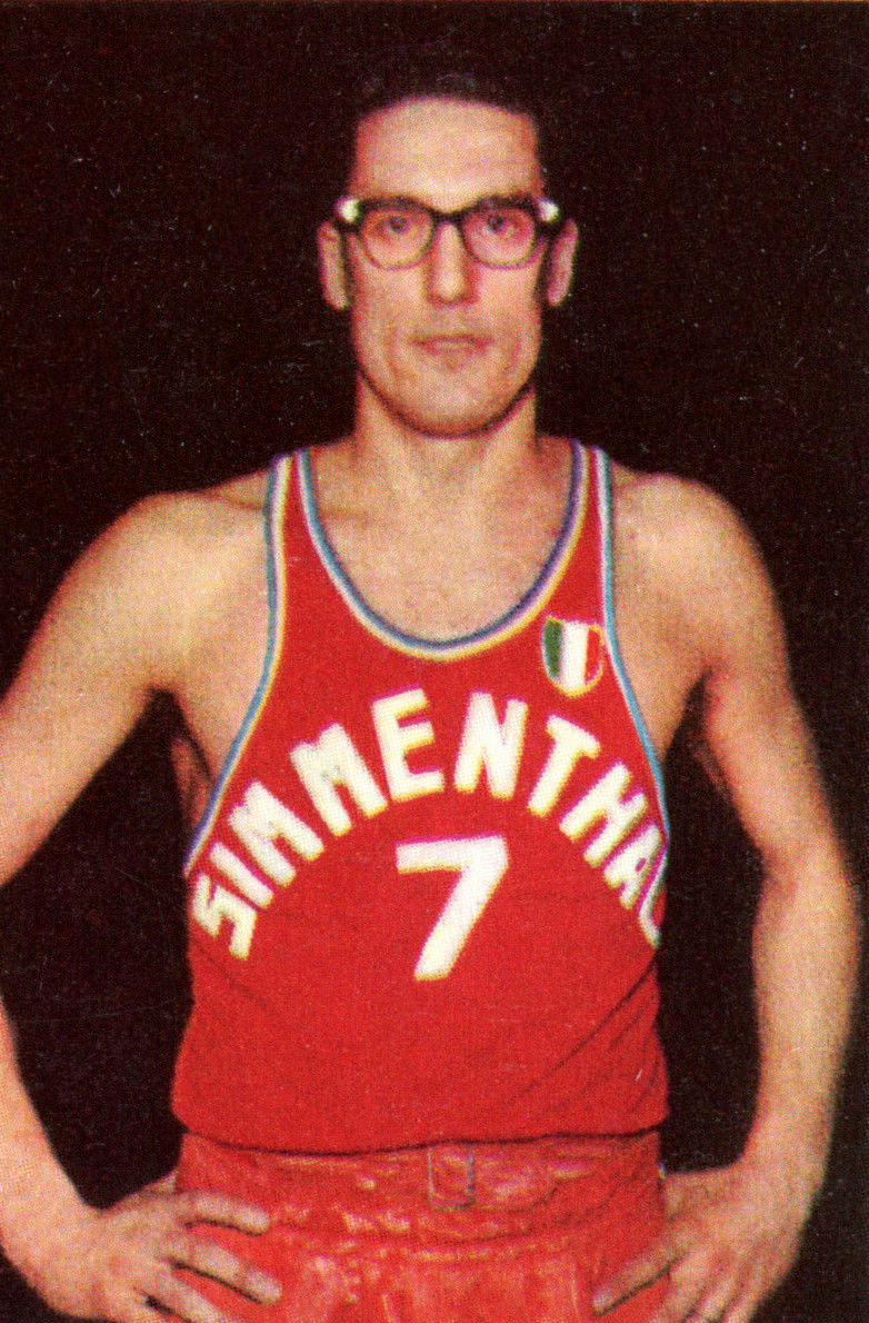 Figurina/Sticker CAMPIONI DELLO SPORT 1967/68-n.380 - G. PIERI - BASKET -rec